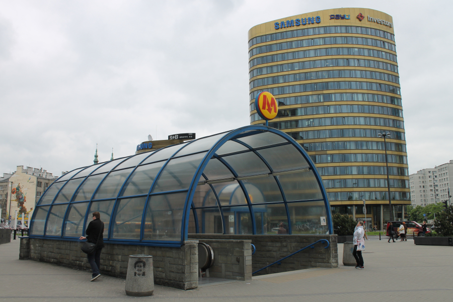 Południowo-zachodnie wejście na stację metra A11 Politechnika na tle wieżowca Zebra Tower.